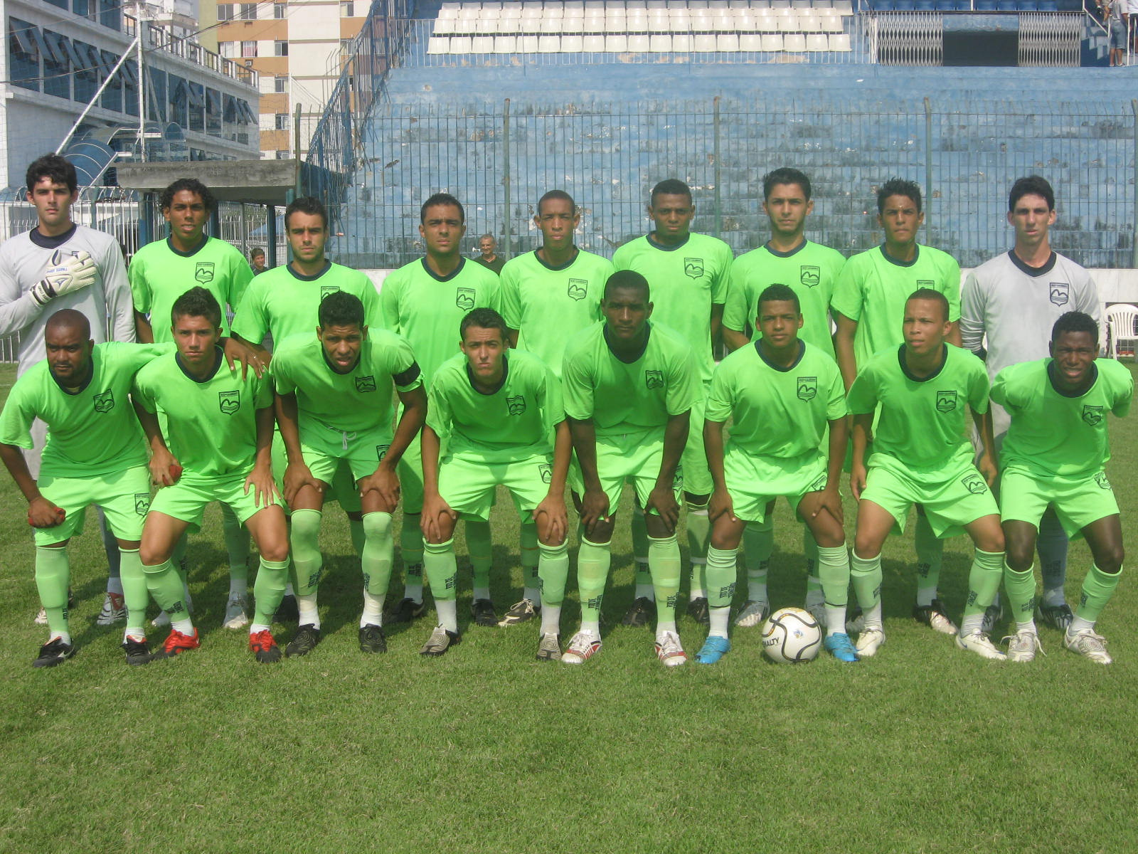 Equipe profissional do Rio de Janeiro, de Piabetá, em partida contra a Esprof, no campo da Rua Bariri, pelo Campeonato Estadual da Série C de Profissionais de 2010, primeira fase.